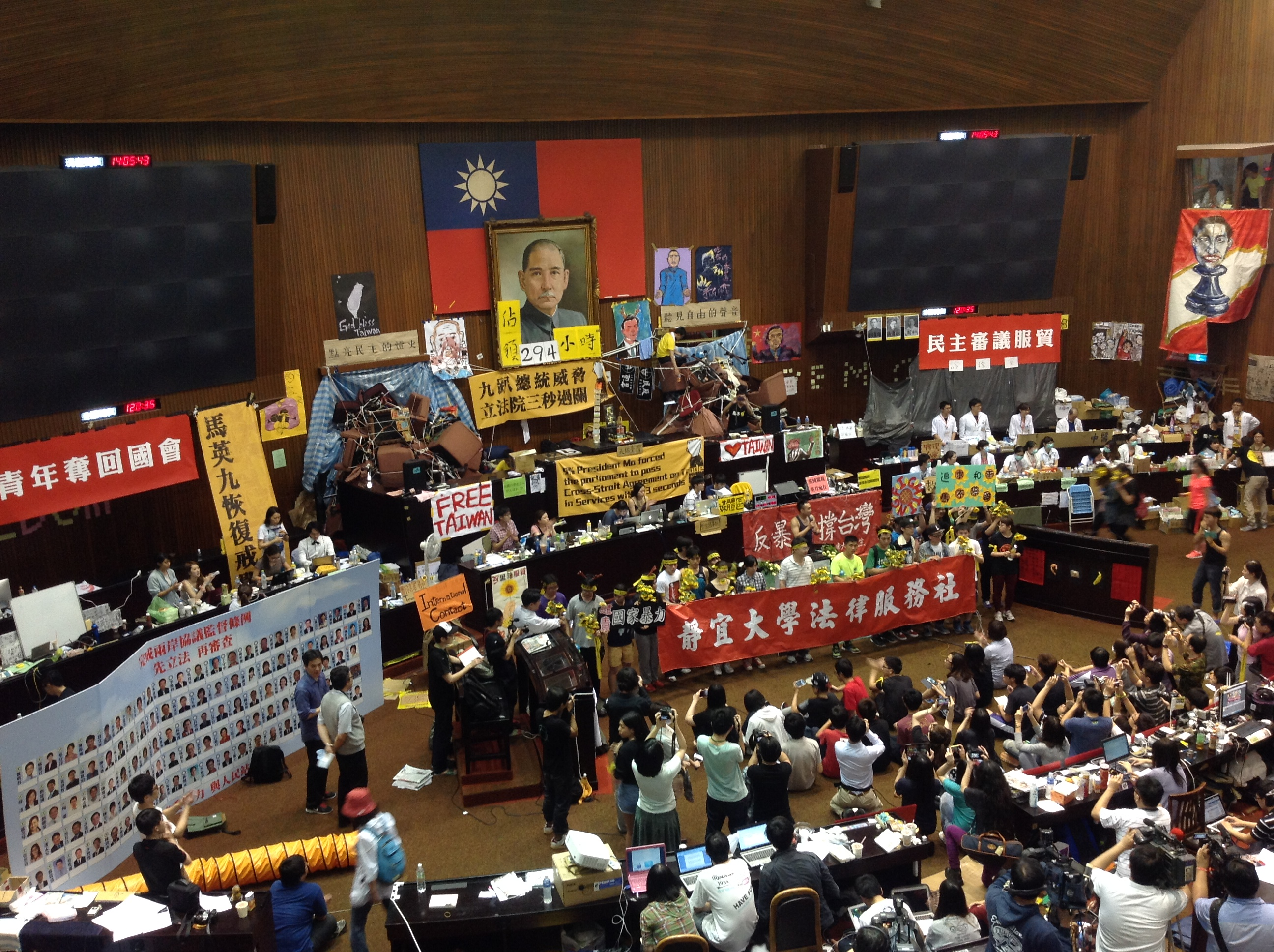 IMG_5968 太陽花學運